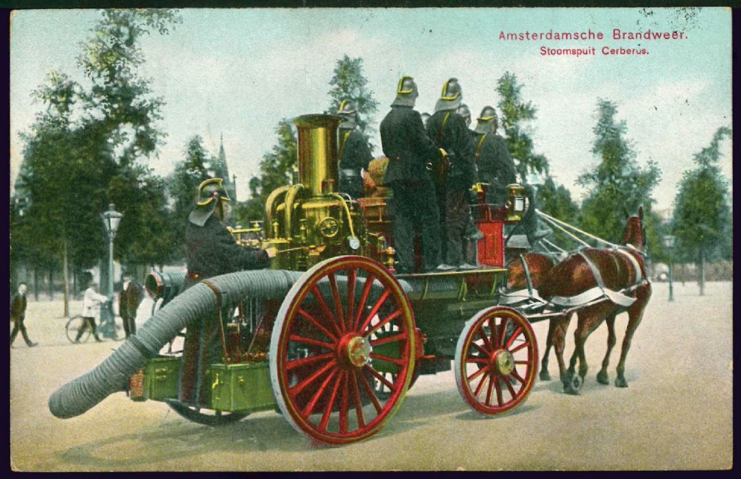 Photographed in Amsterdam between 1900 and 1914.